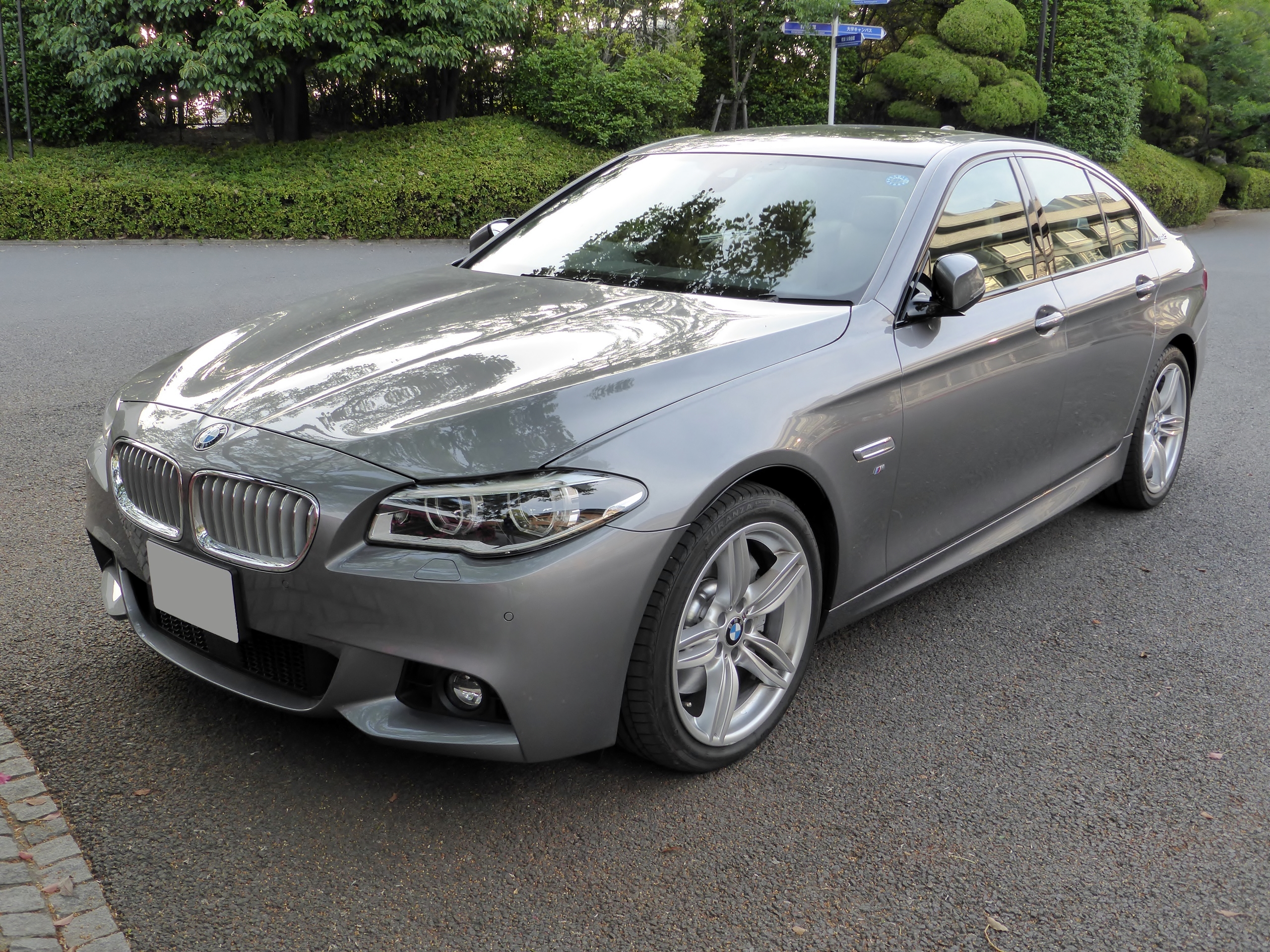 F10型BMW・アクティブハイブリッド5をフロントから撮影。